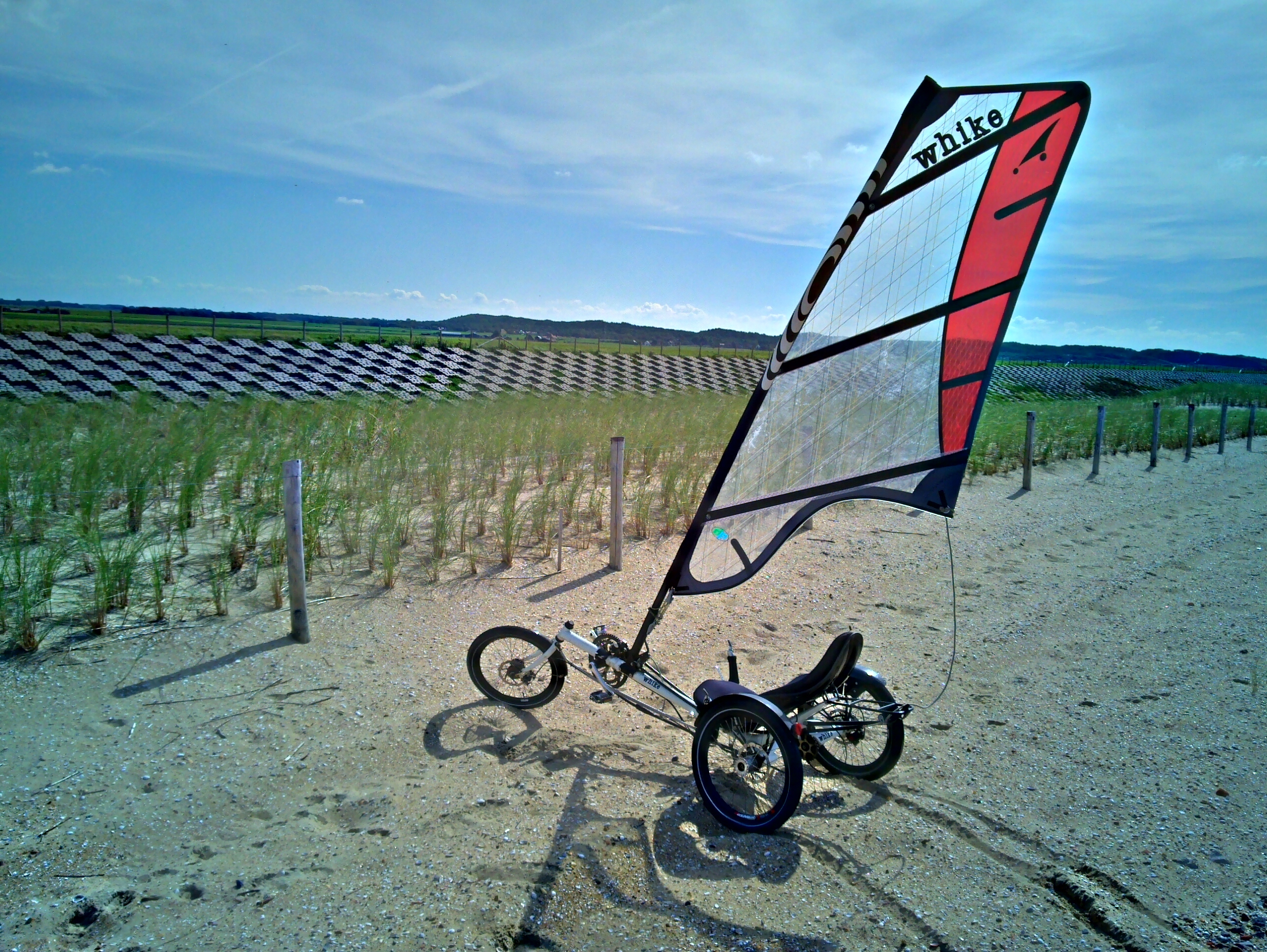 Zeilfiets bij de Pettemer zeewering